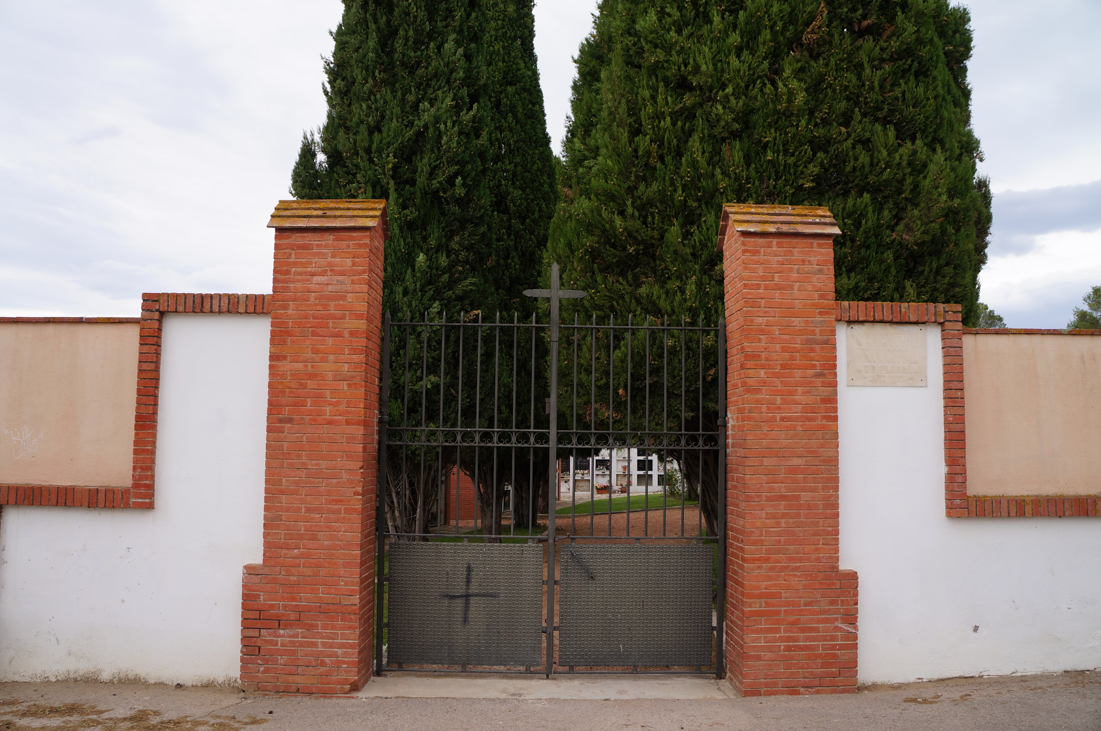 Cementiri de Flaçà